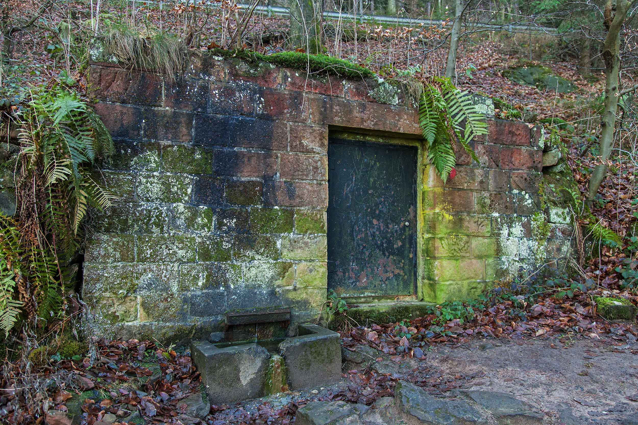 Loosenbrunnen, nördlich vom Weinbiet